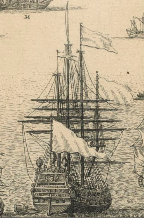 Détail d'une estampe montrant le vaisseau l’Ardent au bombardement de Gênes en 1684. Vaisseau amiral de l'escadre française commandée par Duquesne.